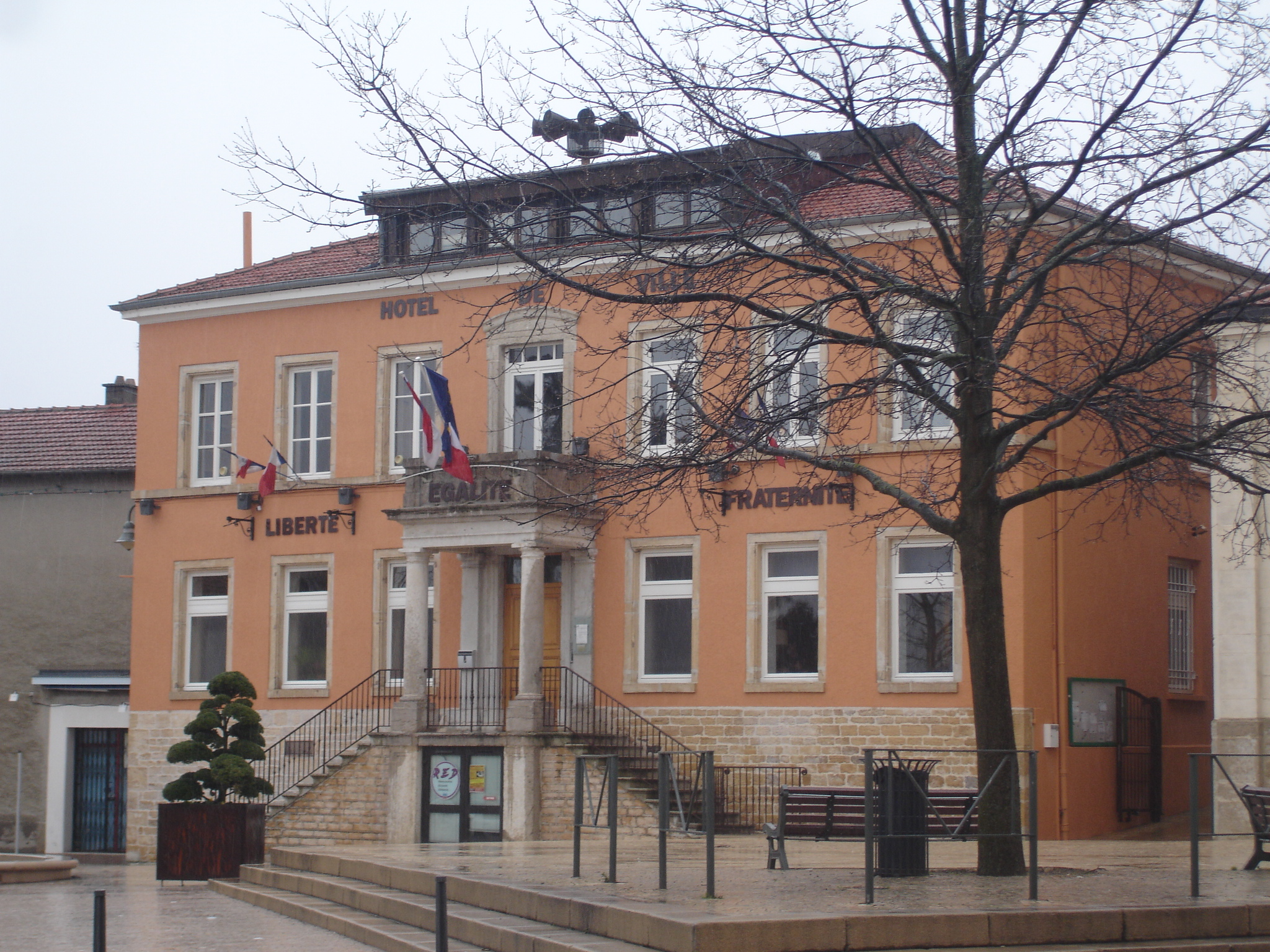 Mions (69) : La mairie